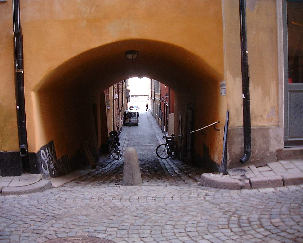 Ferkens Gränd from Österlånggatan, Gamla stan, Stockholm.